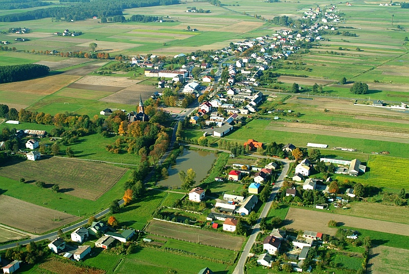 Zdjęcie lotnicze miejscowości Jakubów